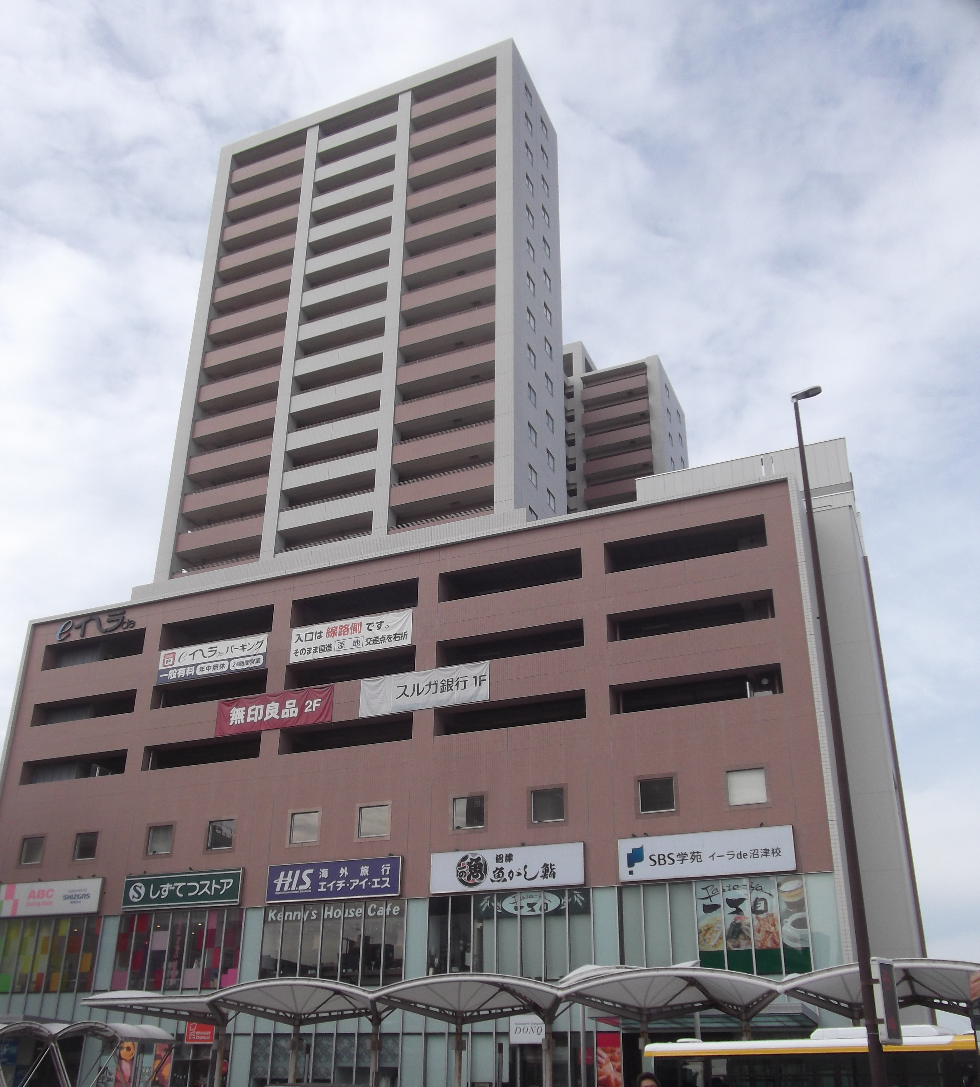 沼津市駅前にあるイーラde。